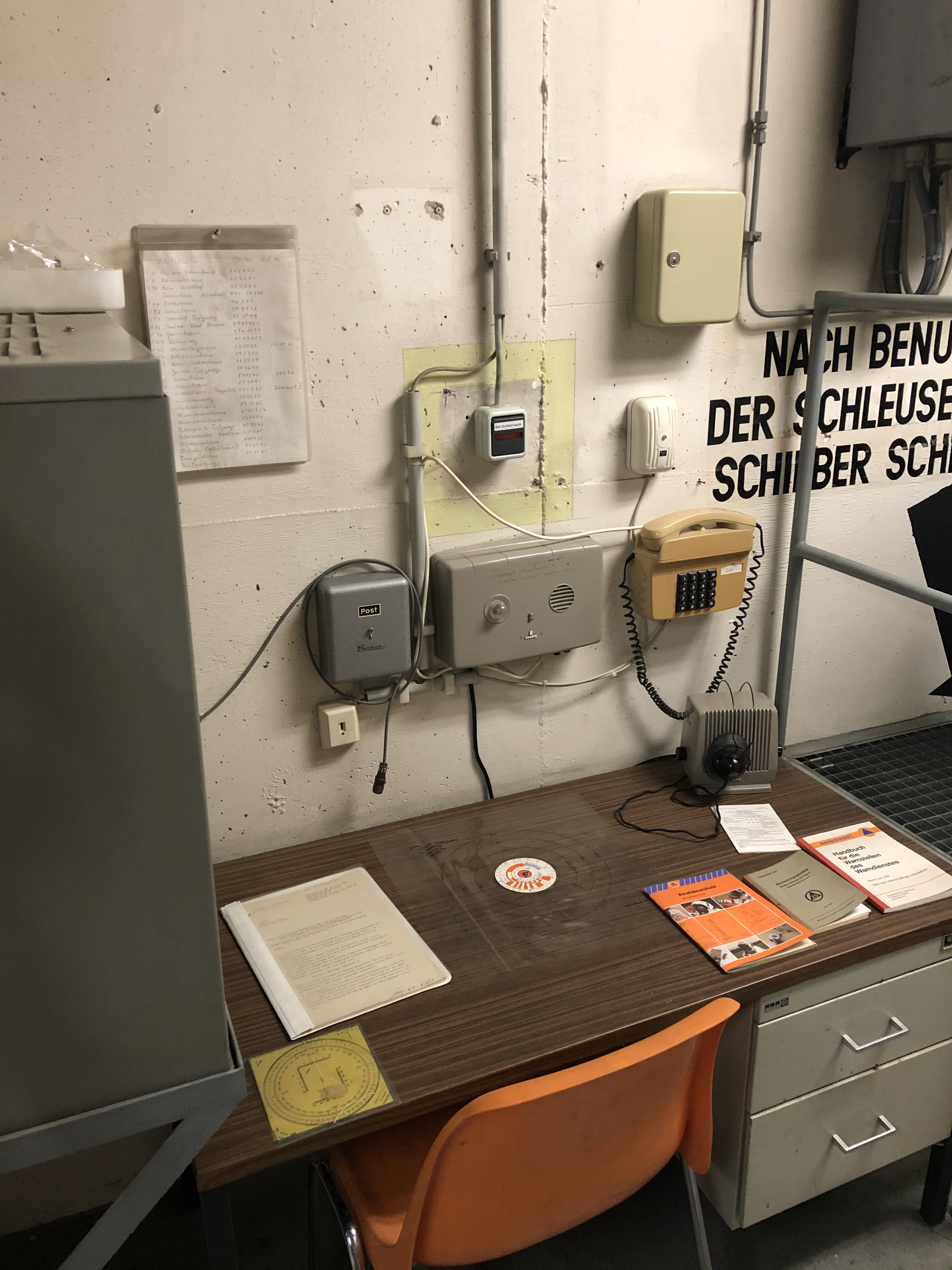 Mehrzweckanlage Sedanplatz Raum des Bunkerwarts